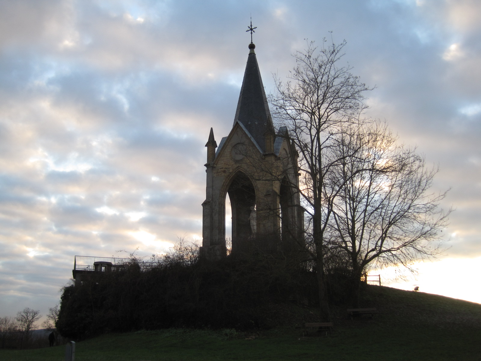 Notre-Dame-de-la-Motte